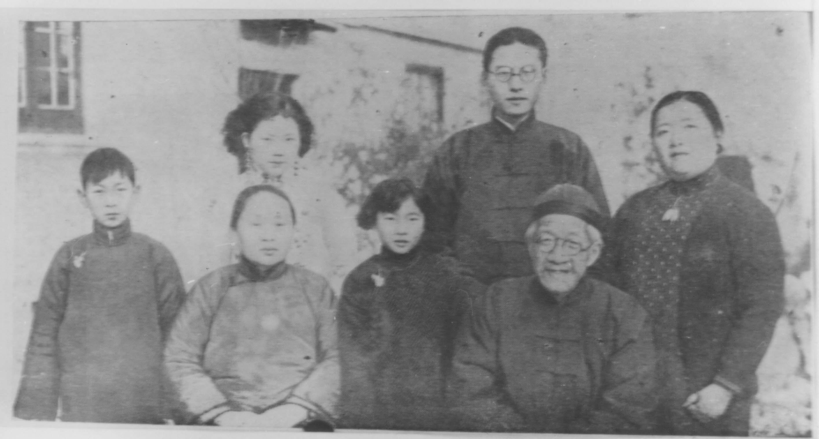 图为章太炎之家庭。前排右起章太炎幼女，章夫人汤国梨，后排长女章叕，长子章导，媳彭女士，幼子章奇。